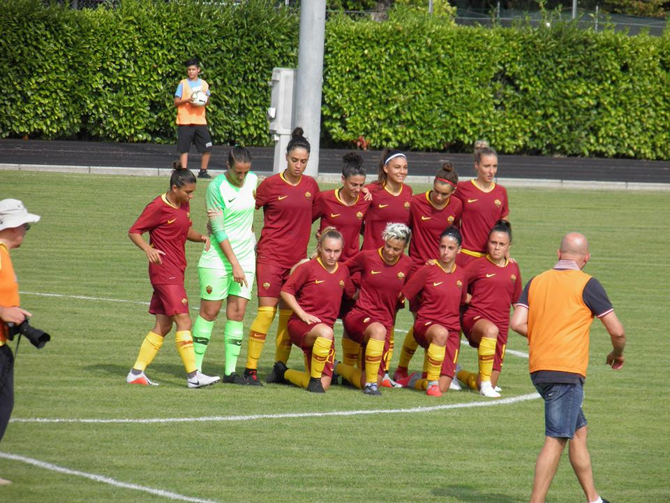 San Polo d'Enza, stadio Comunale, 28 settembre 2018. La formazione dell'A.S. Roma Femminile scesa in campo nella trasferta persa contro l'A.S.D. Sassuolo Calcio Femminile (3-2), valevole per la 1ª giornata del campionato italiano di Serie A di calcio femminile 2018-19.